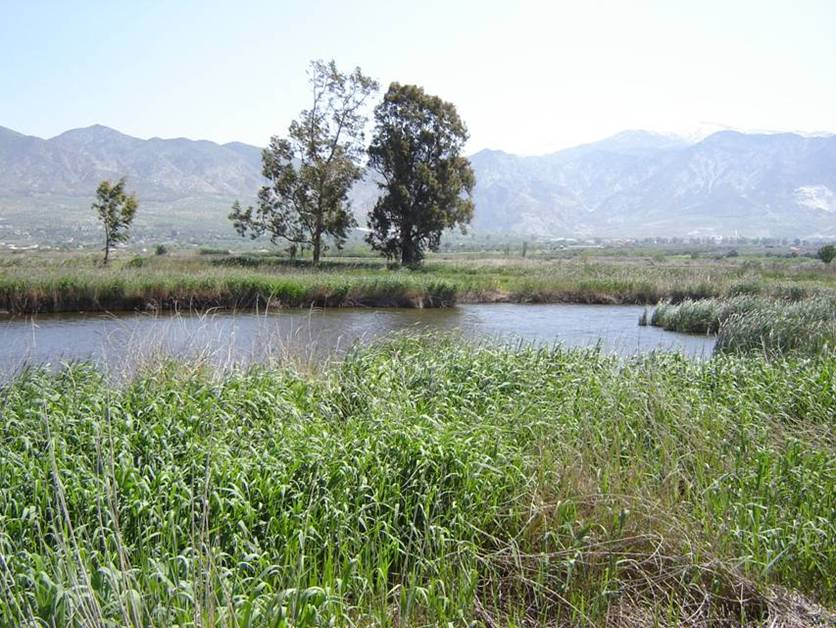 Laguna artificial como consecuencia del llenado de agua de un hueco después de haber sacado la turba.